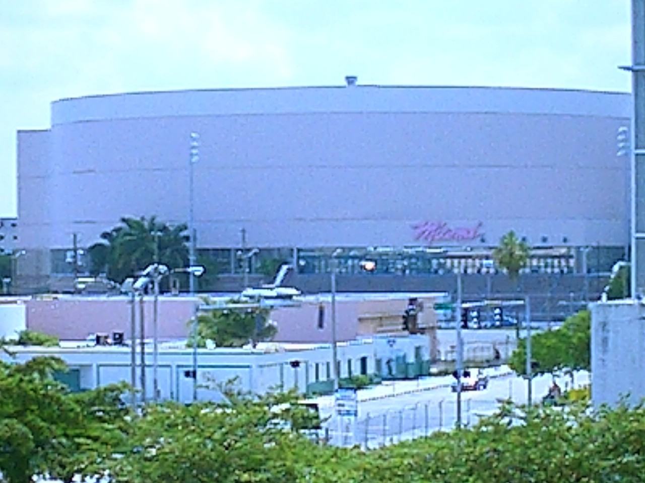 Digital photo taken by Marc Averette. Miami arena photo circa 2002.